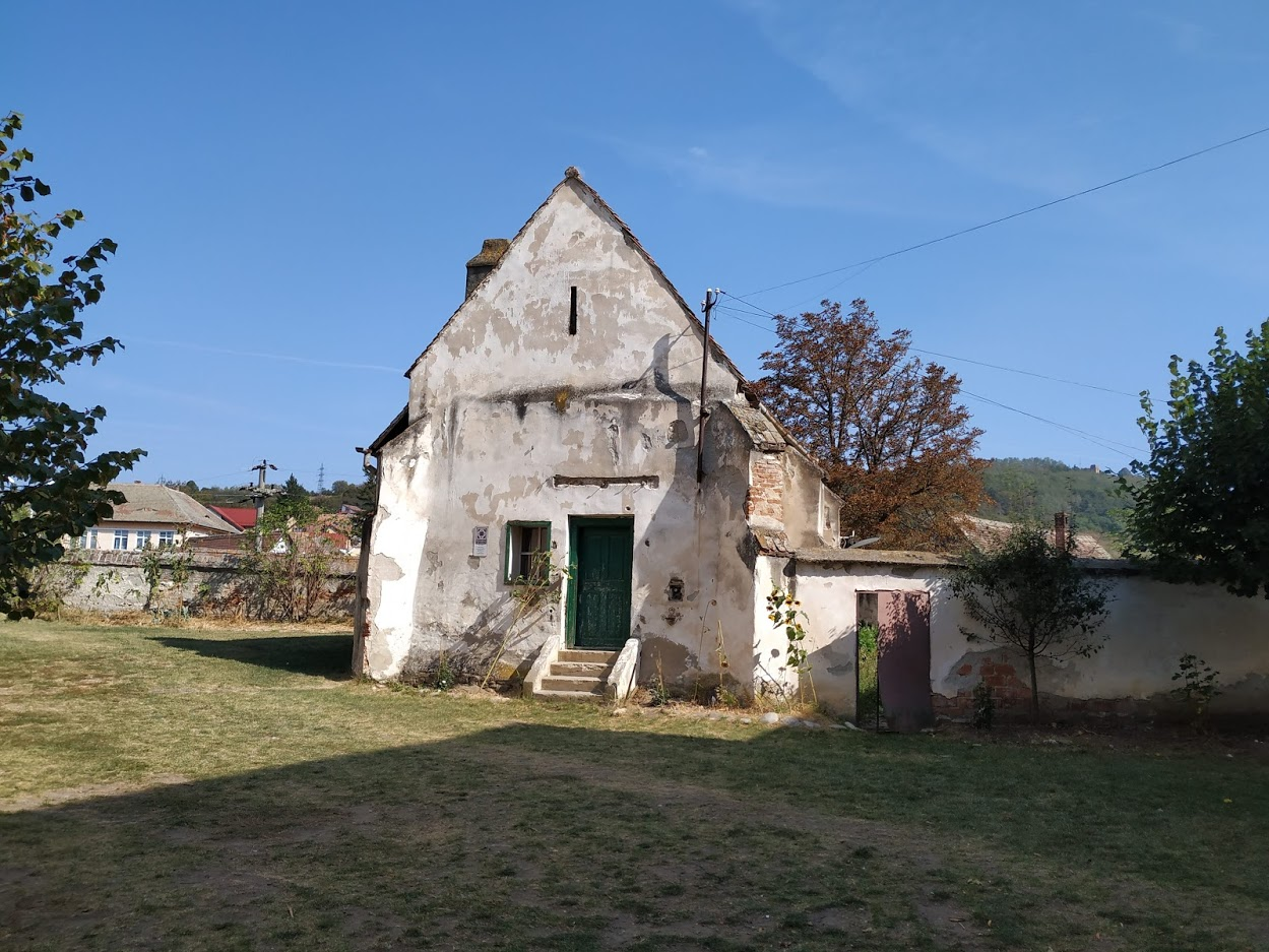 Fosta capelă, azi locuință 02